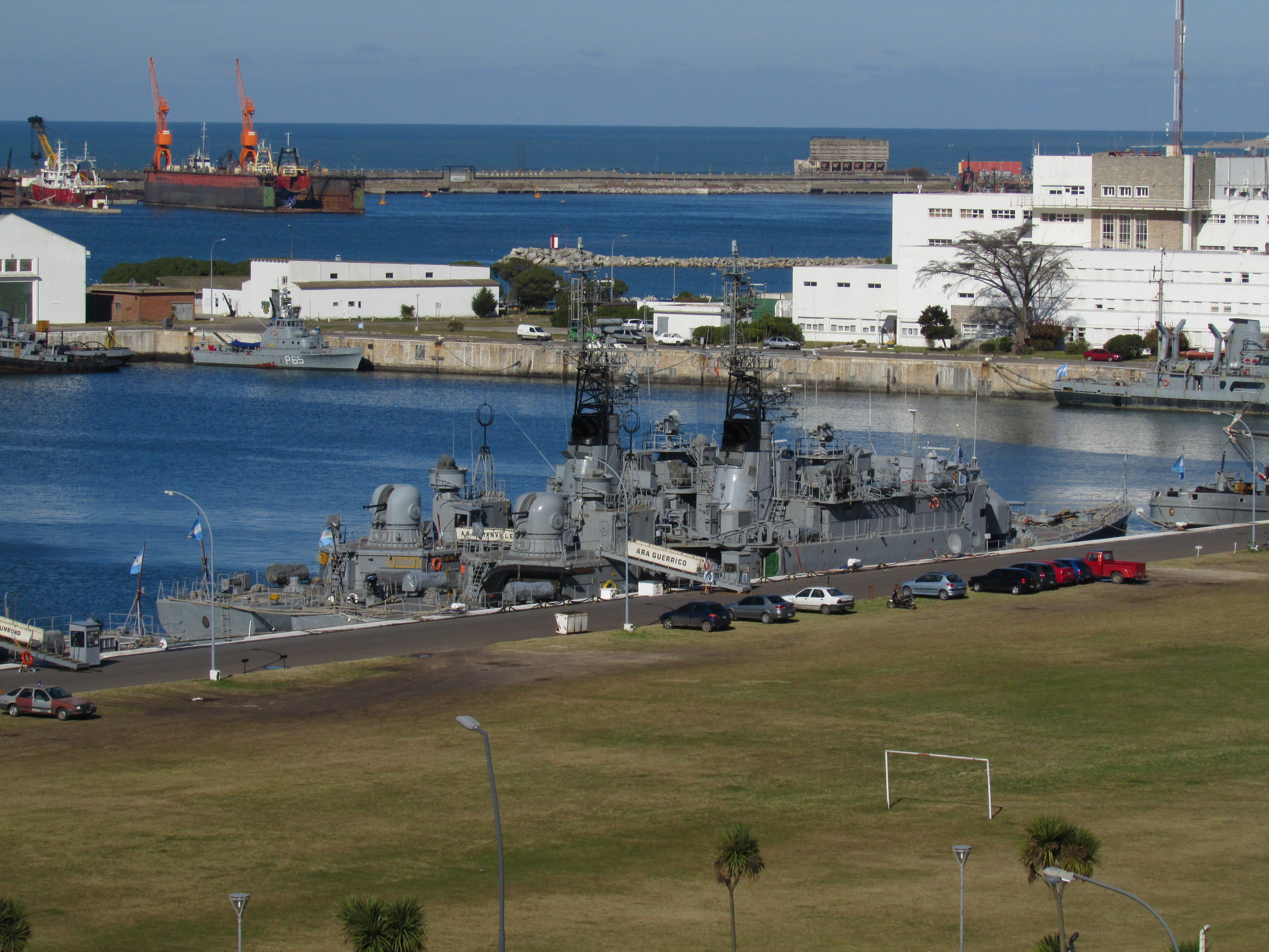 Corbetas argentinas ARA Guerrico (derecha) y ARA Granville (izquierda) en base naval Mar del Plata, provincia de Buenos Aires, Argentina.